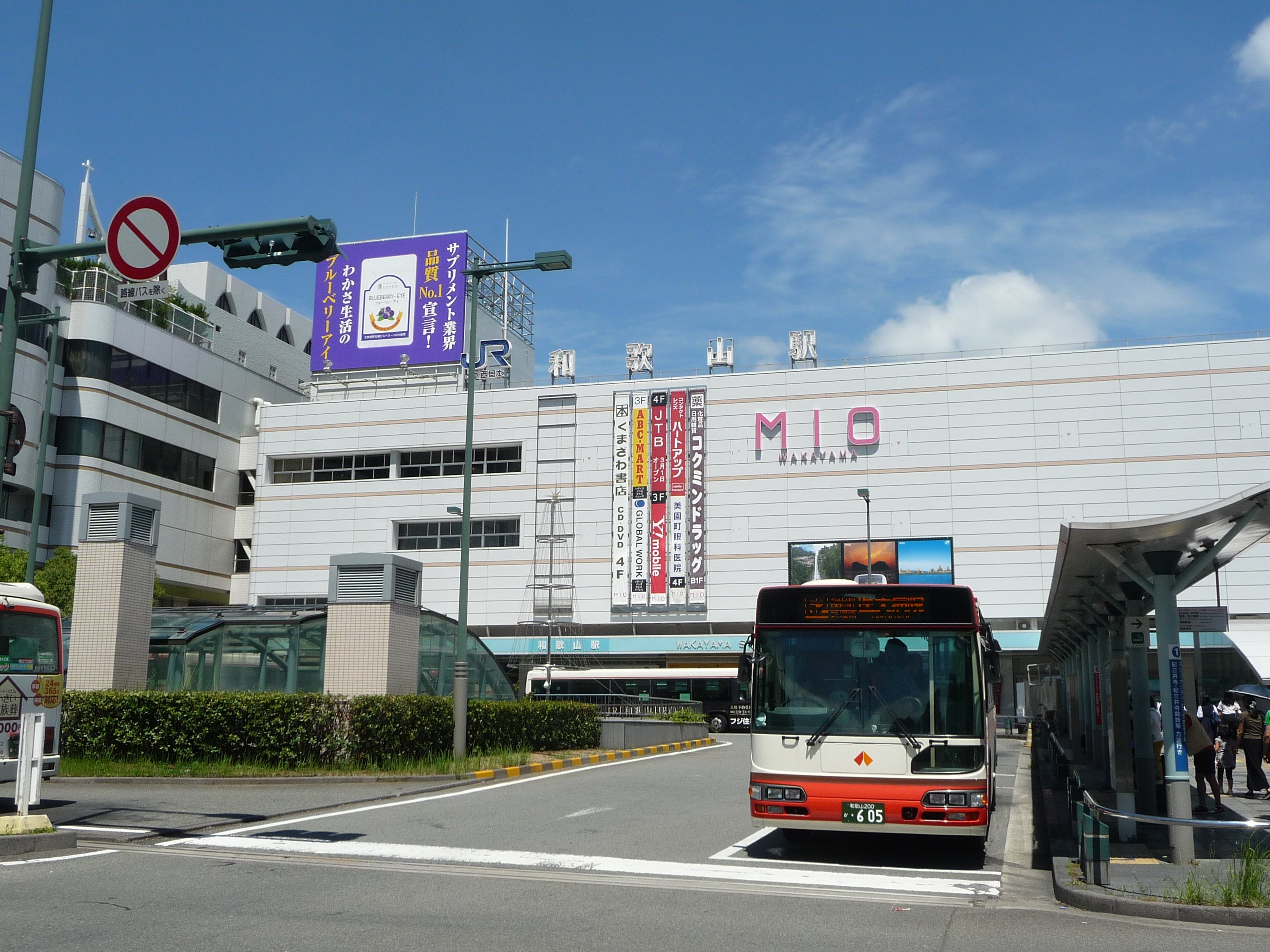 Bahnhof der japanischen Stadt Wakayama